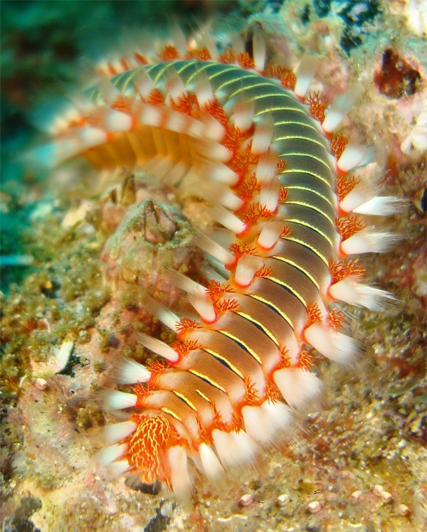 Gusano de fuego Hermodice carunculata, Tenerife. Las Galletas, Islas Canarias, España